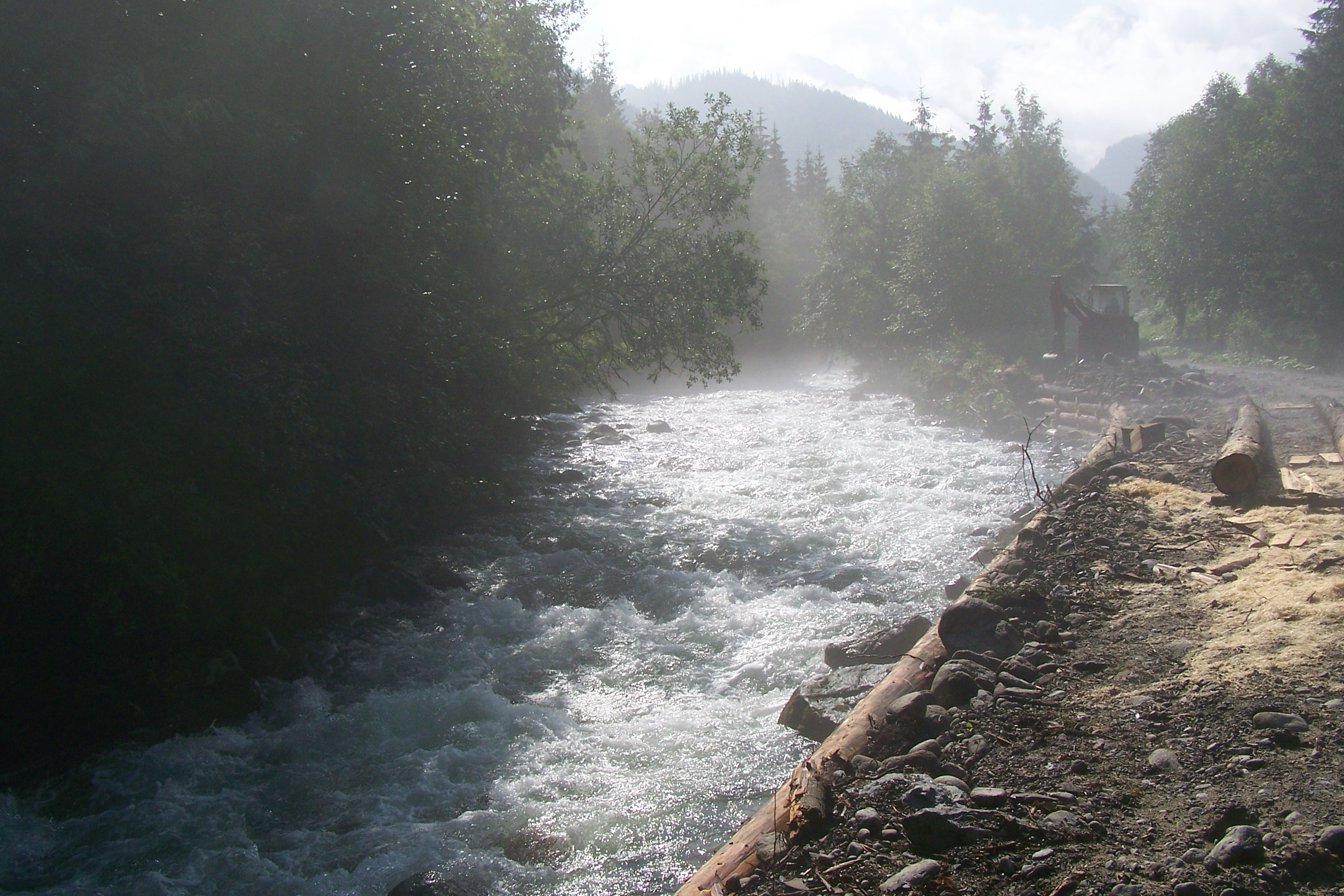 Dolina Jaworowa